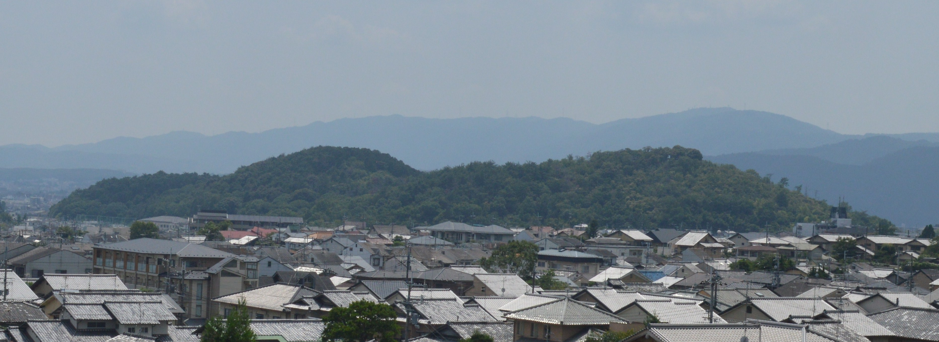 京都市右京区御室 双ヶ丘。衣笠山山麓から南西を向いて撮影。右から左に、一の丘、二の丘、三の丘。